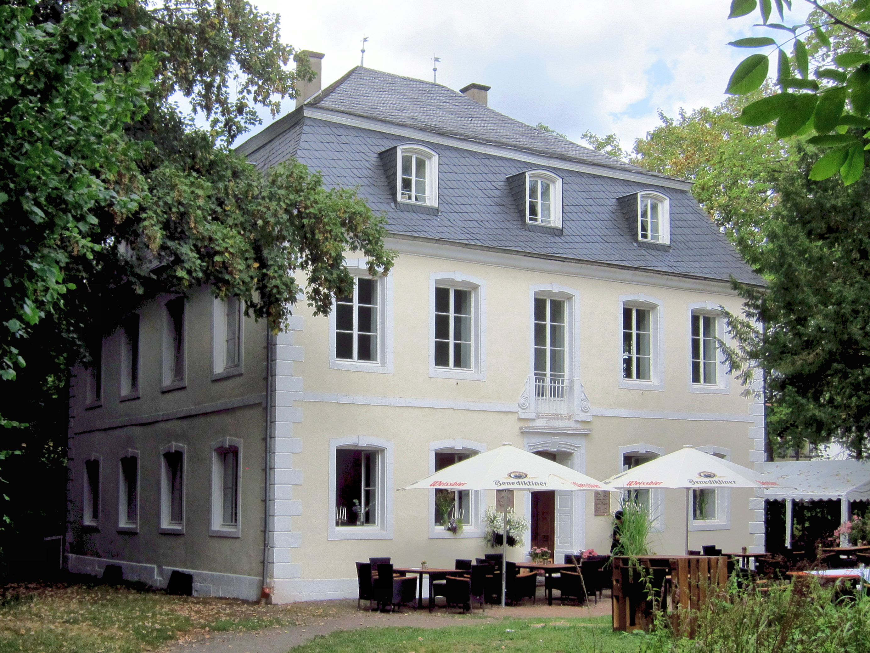 Schloss Buseck in Eppelborn OT Bubach-Calmesweiler mit Café-Betrieb